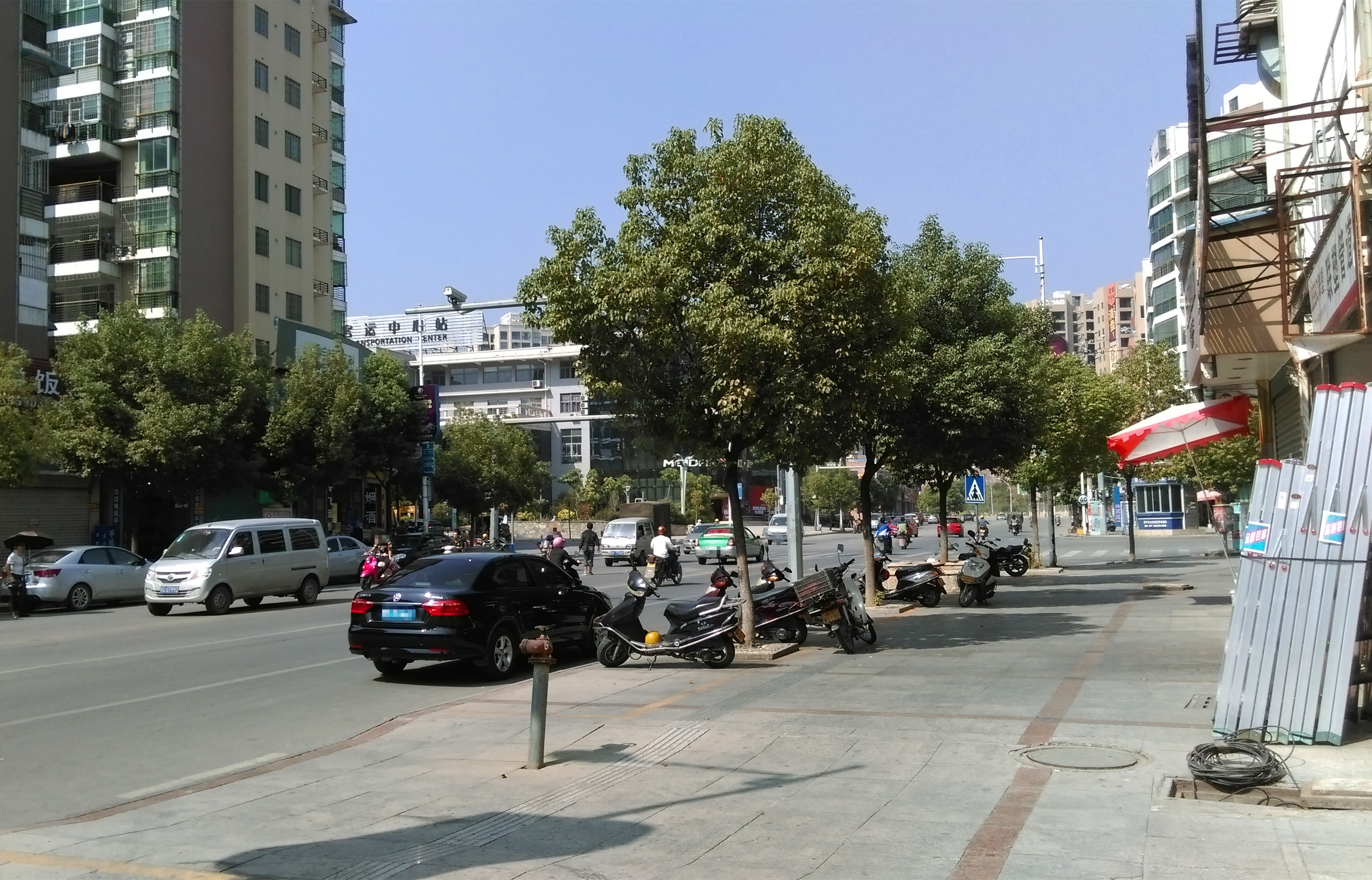 漳平市客运中心站